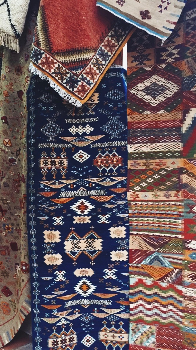 سجاد مغربية في متجر من متاجر شارع القناصلة في مدينة الرباط